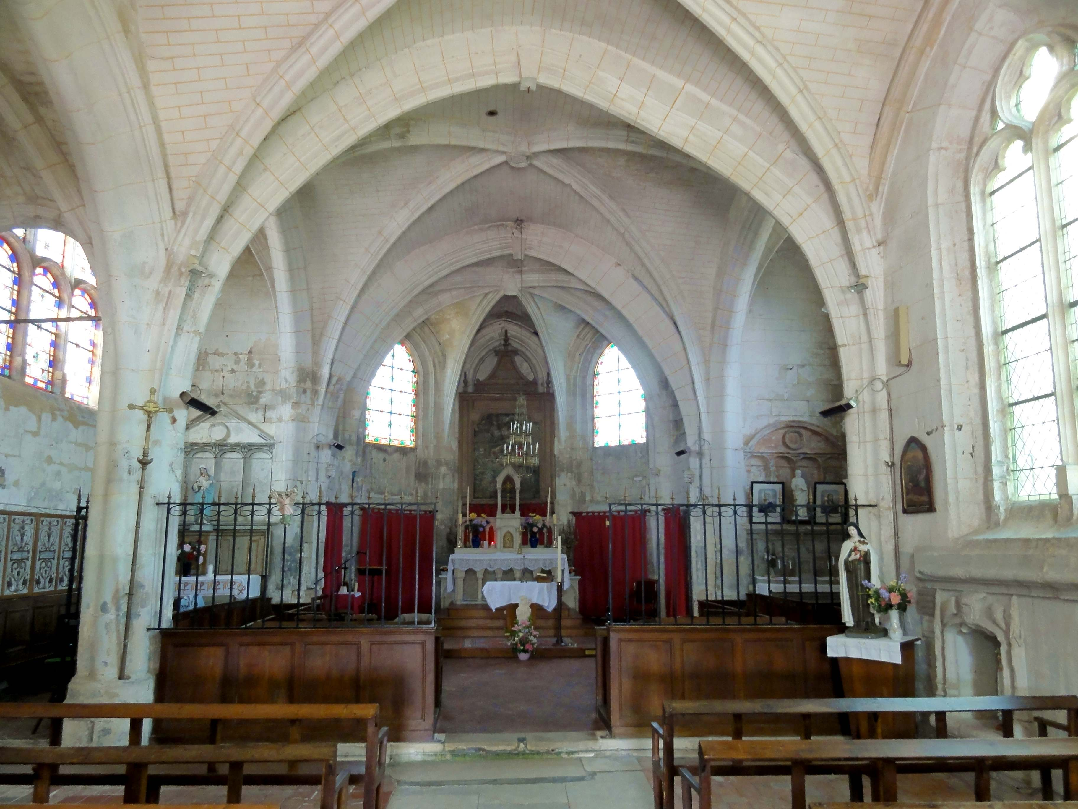 Intérieur de l'église Saint-Wandrille de Rivecourt (voir titre).